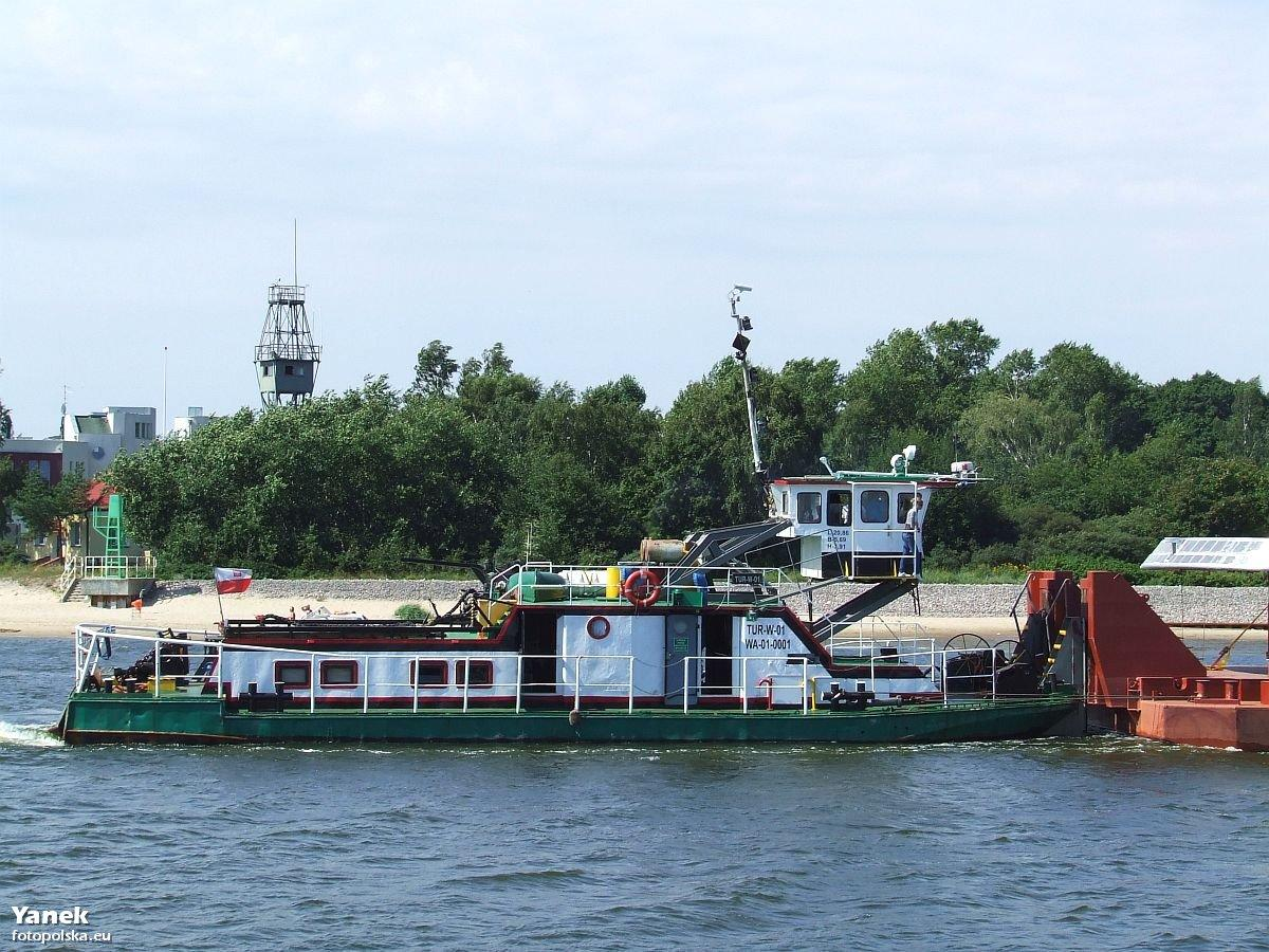 TUR W-01 pcha zestaw na Wiśle Śmiałej